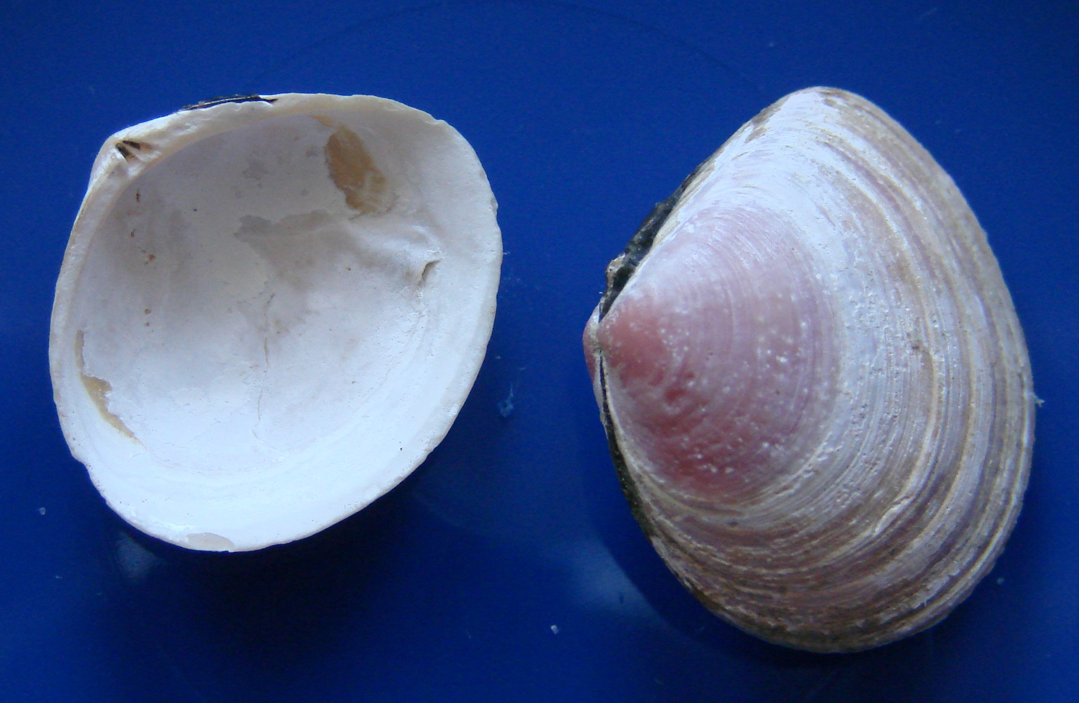 Macoma baltica